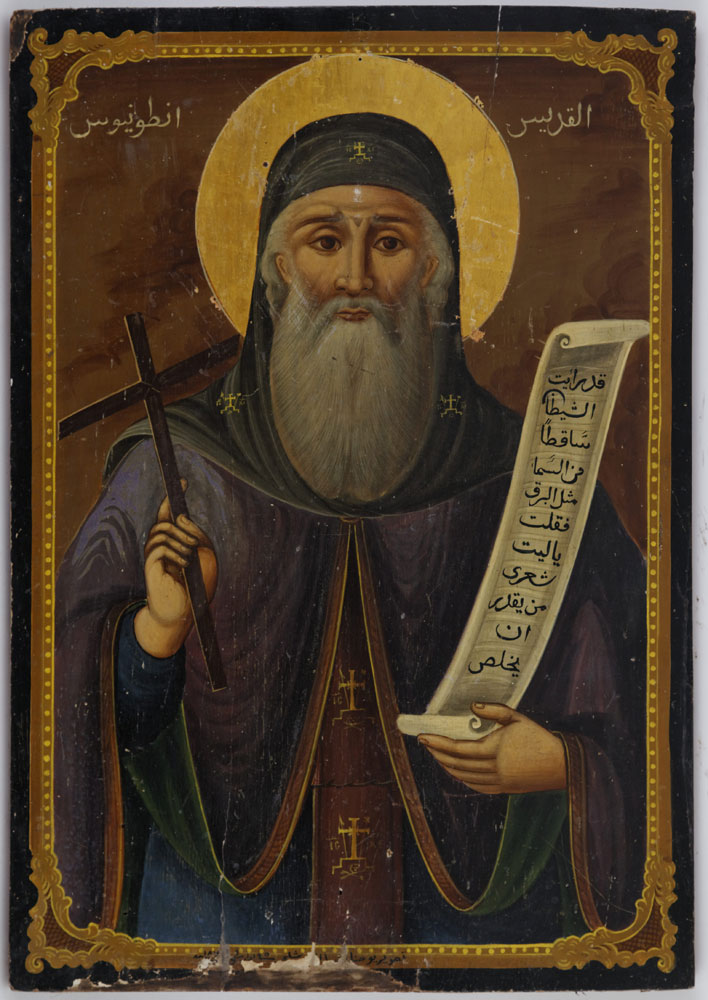 Saint Antoine le Grand, icône à l'huile sur toile marouflée sur panneau, de style copte, fin XIXe/début XXe s., 54x37 cm